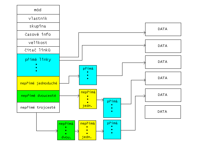 Datová struktura i-node používaná v unixových souborových systémech.